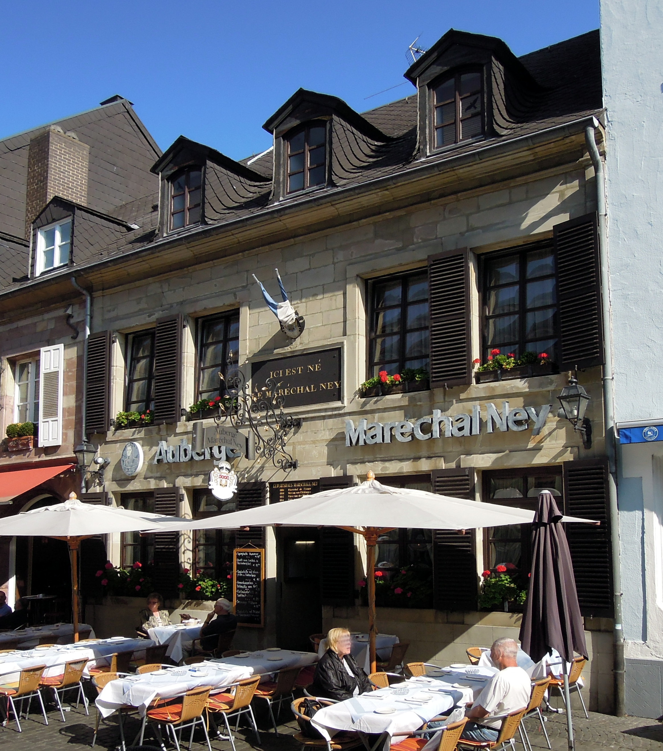 Bierstraße 13, Marschall-Ney-Haus, Wohnhaus, 4. Viertel 17. Jh., Umbau 19. Jh. (Ensemblebestandteil)